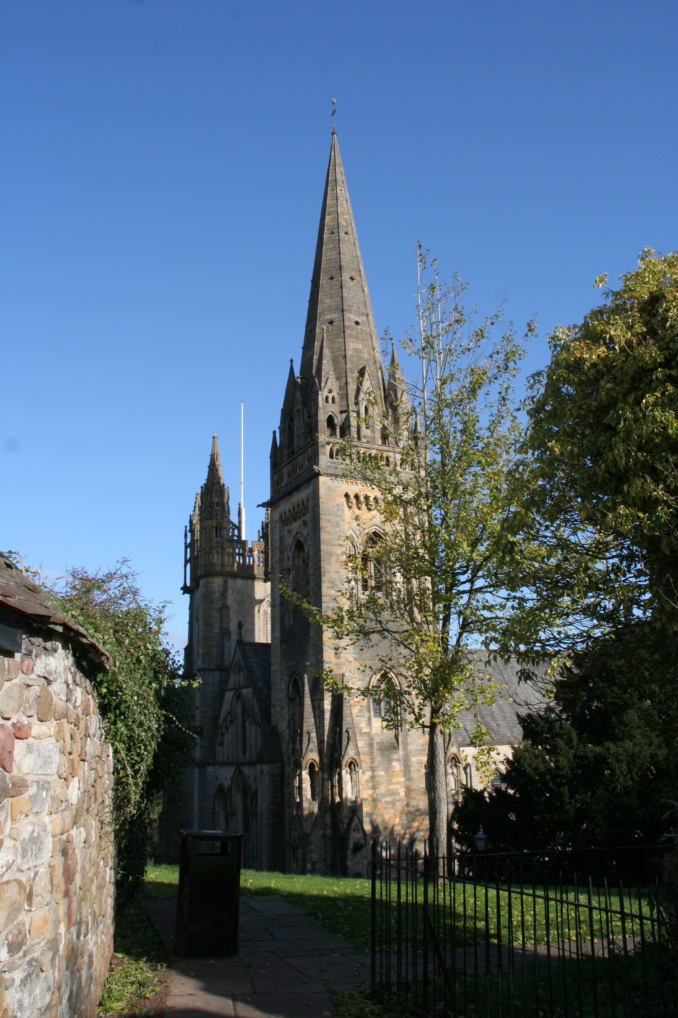 Llandaff Cathedral